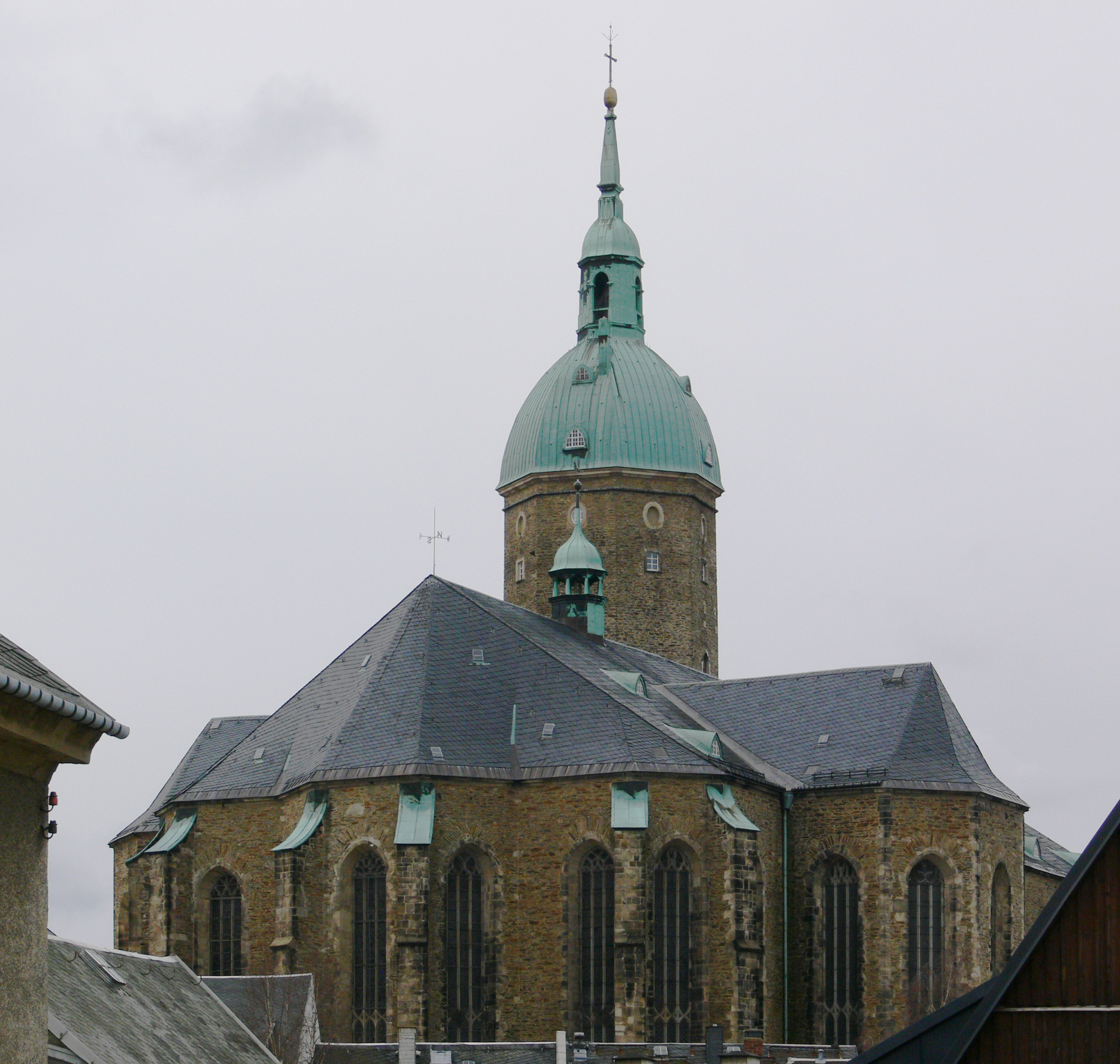 Annaberg-Buchholz, St. Annenkirche, von der Farbegasse aus gesehen